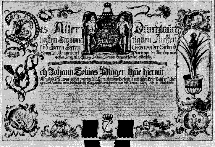 Lærebrev fra 1784 - Gartnerne var ofte indvandrede tyskere, og det lærebrev, som "drengene« fik udstedt efter en treårig læretid, var ligeledes affattet på tysk. Det ældste, bevarede svendebrev er fra 1774, det her givne er yngre, fra 1784. Det er udstedt af I.T. Pflüger, gartner ved Hørsholm Slot til C.L. Hjort, senere gartner på Bregentved. De to mørke bælter forneden er de øvre ender af to, ca. 1 m lange silkebånd, der fastholder den hvide benkapsel med gartnerens segl.